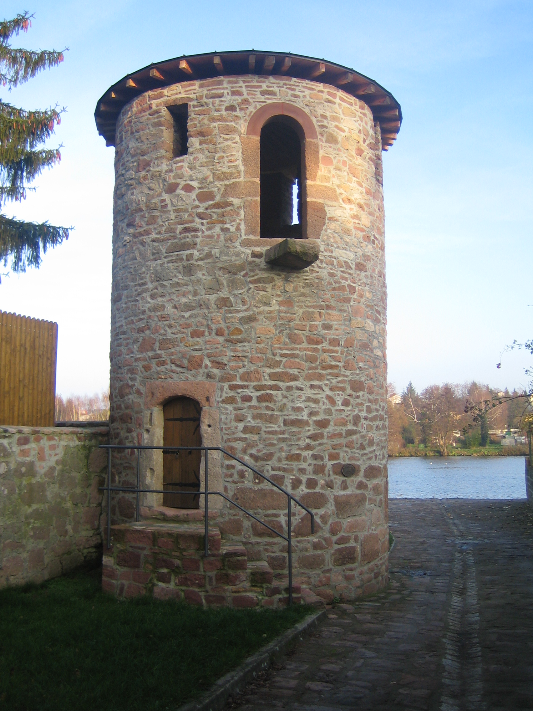 Der im Jahre 2006 restaurierte Turm am Main in Niedernberg, Bayern, DeutschlandAktennummer des Baudenkmals: D-6-76-144-13